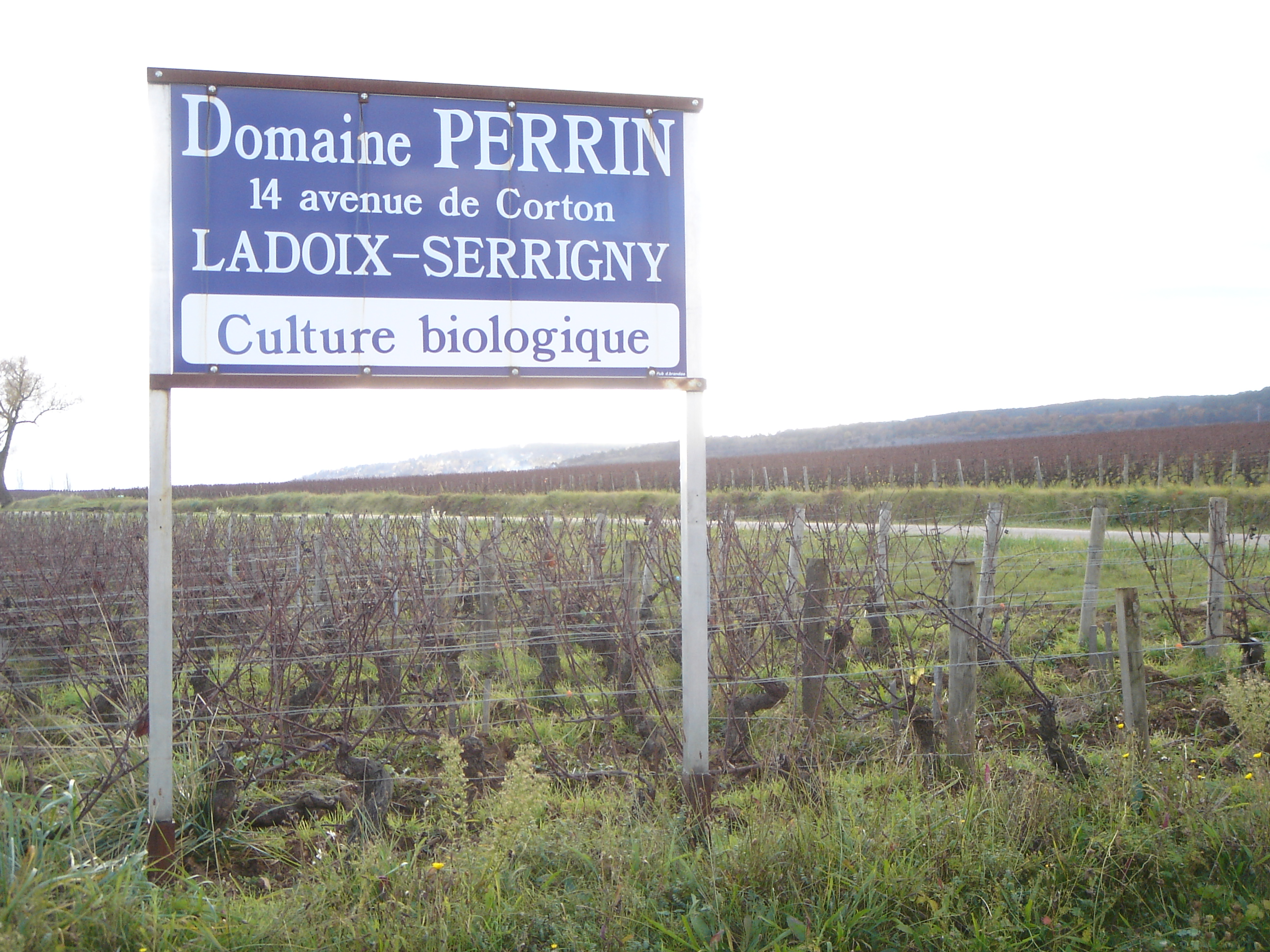 Burgundy Region, France November 13, 2008